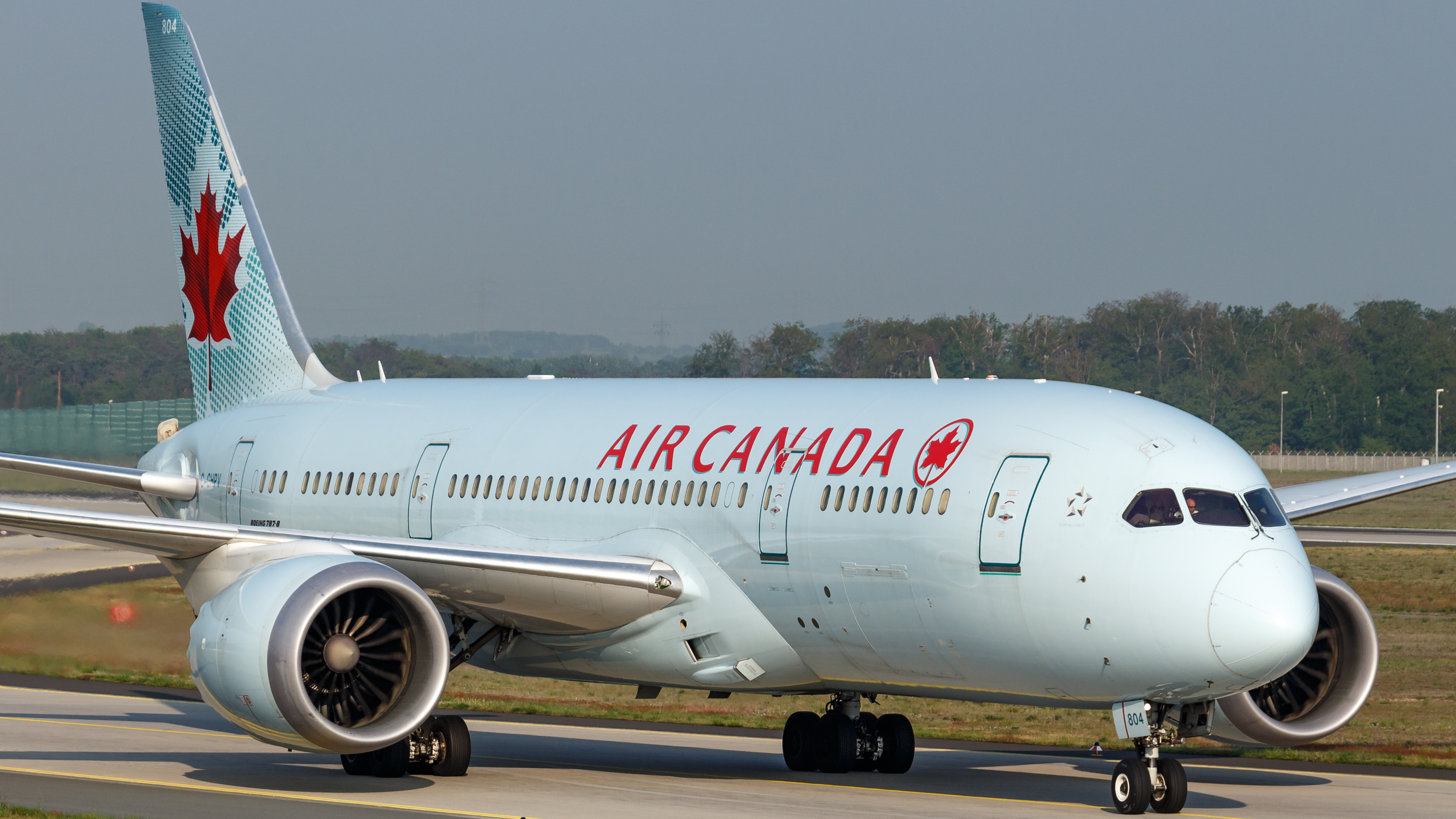 C-GHPV Air Canada B788 FRA